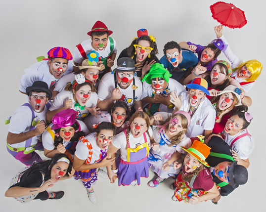 Palhaços da Ong